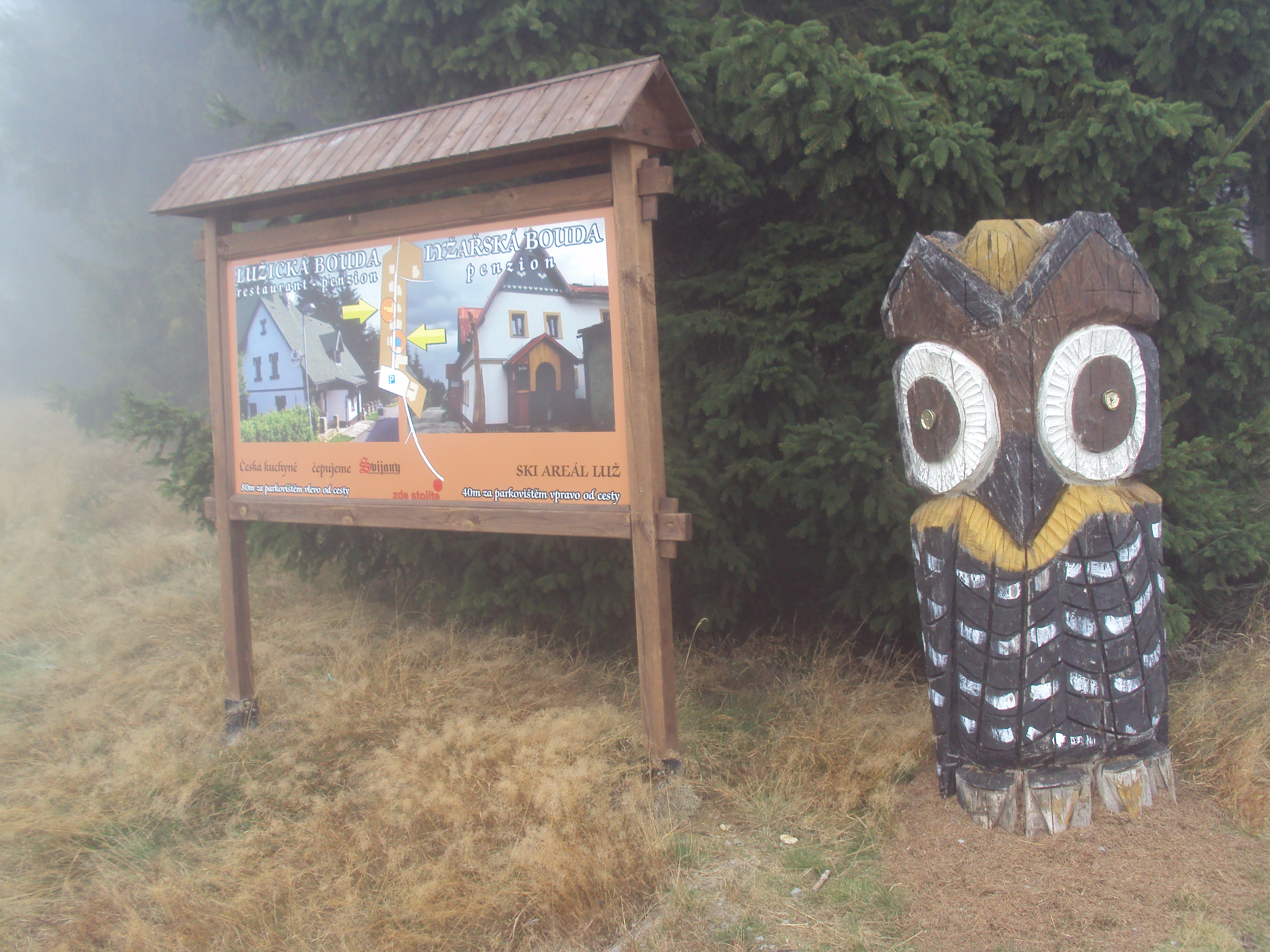 Cedule u silnice před areálem v Myslivnách pod Luží